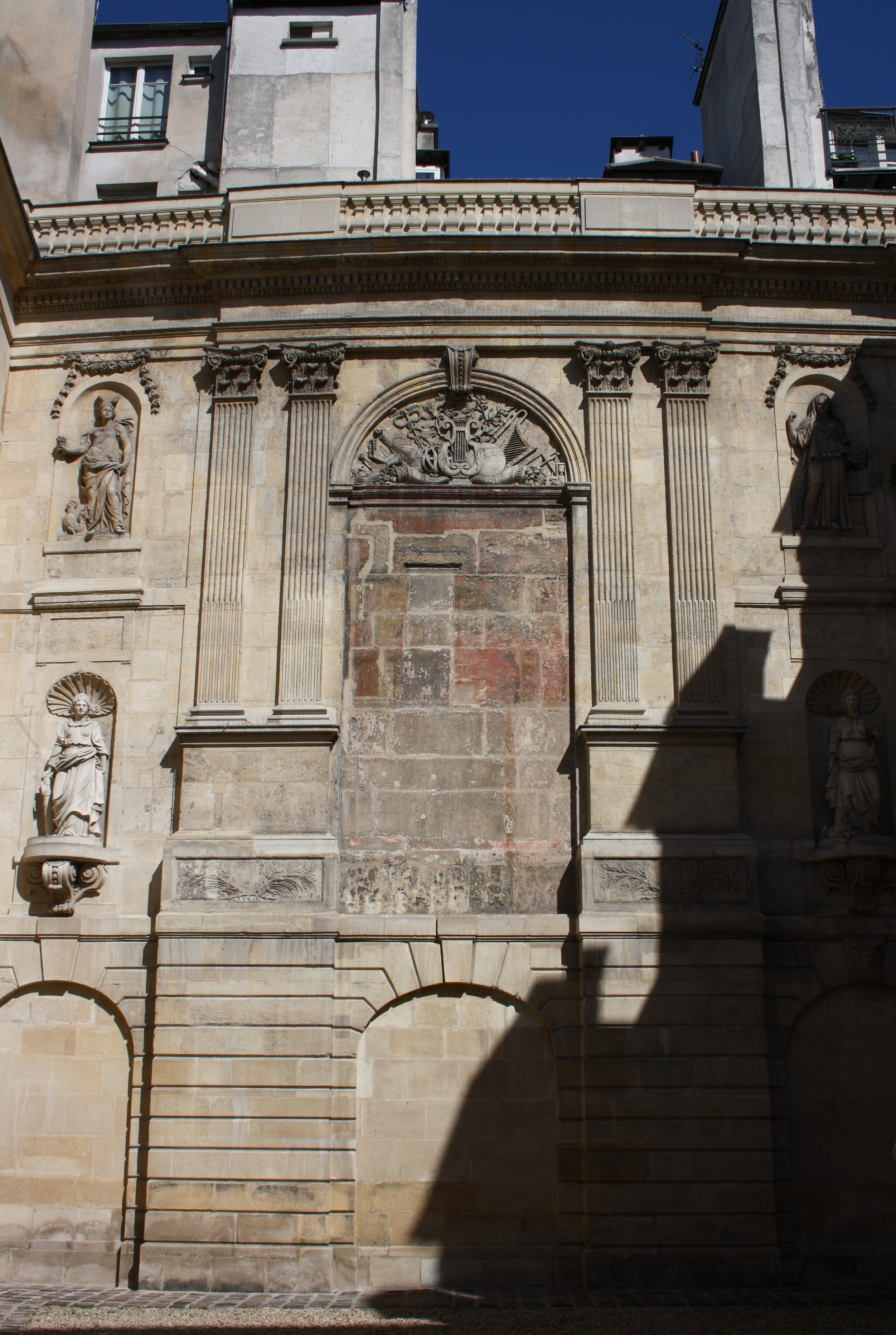 Hôtel Amelot de Bisseuil (47, rue Vieille-du-Tempel bzw. 10, rue des Guillemites im 4. Arrondissement von Paris), Fassade des zweiten Innenhofs